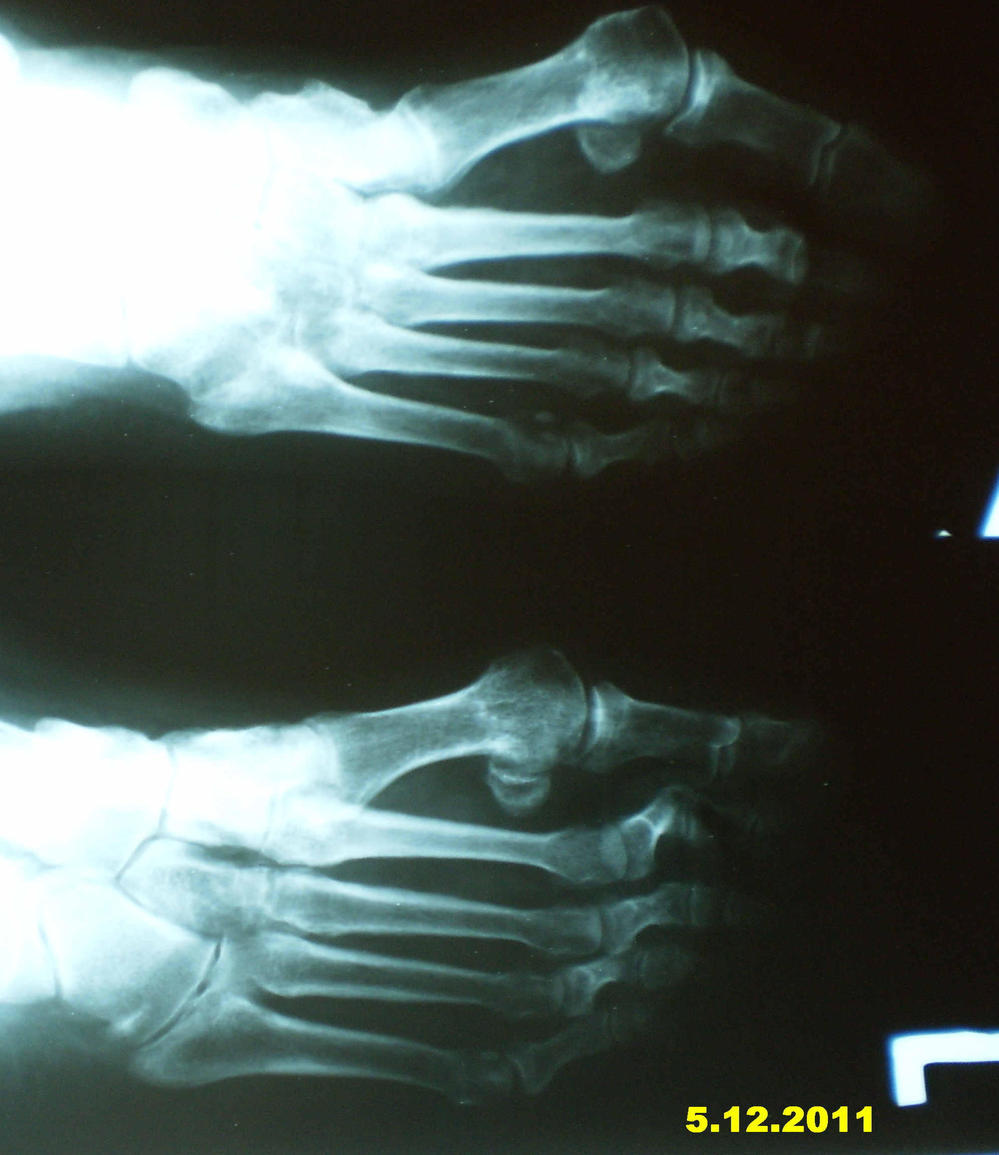 Radiogram artroze (u anglosaksonskoj literaturi osteoartritisa) interfalangealnih zglobova prstiju leve noge u dva pravca. Autor: dr Milorad Dimić, Niš, Srbija, 05.12.2011